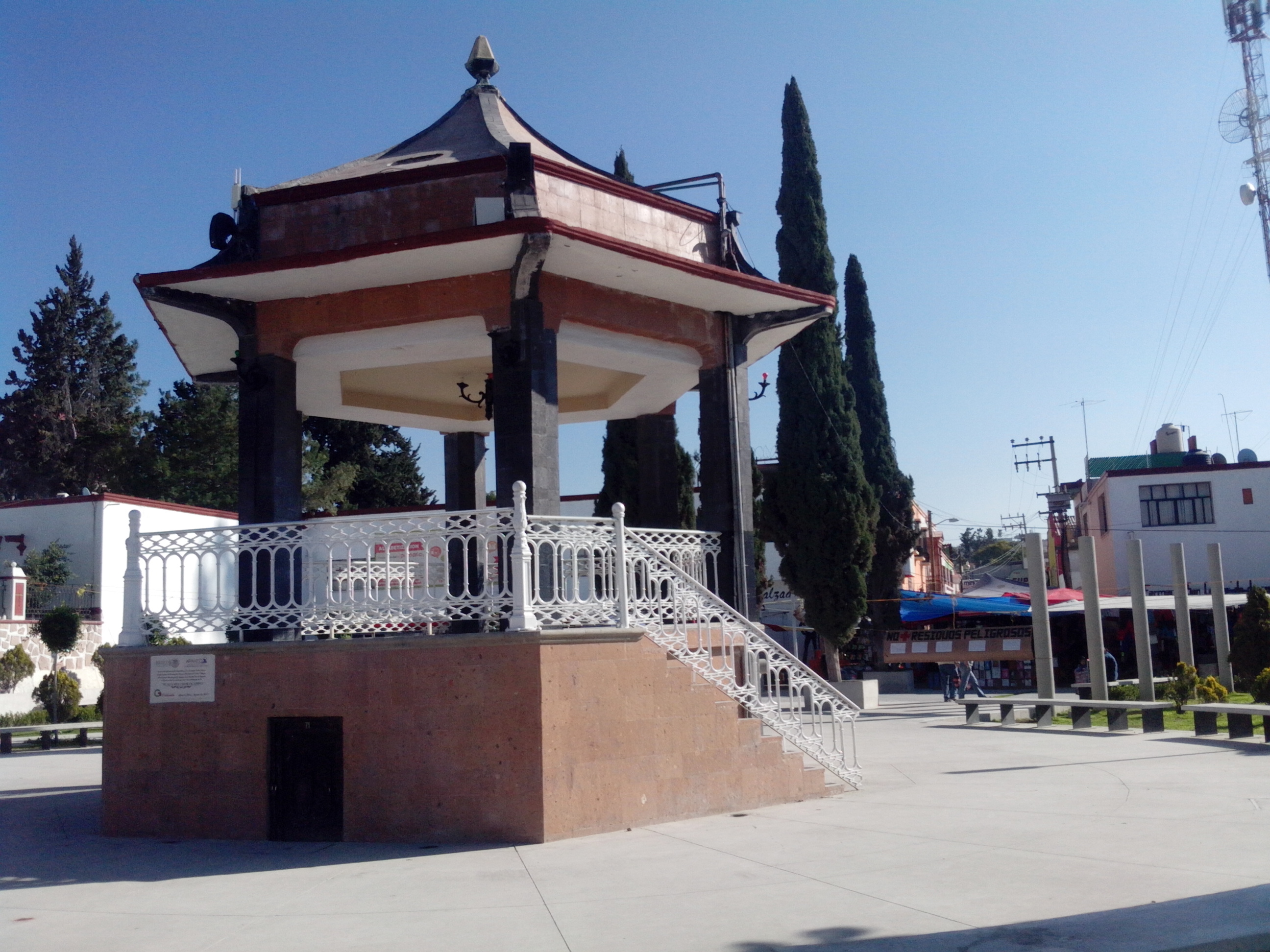 Kiosko de Apaxco; estado de Mexico